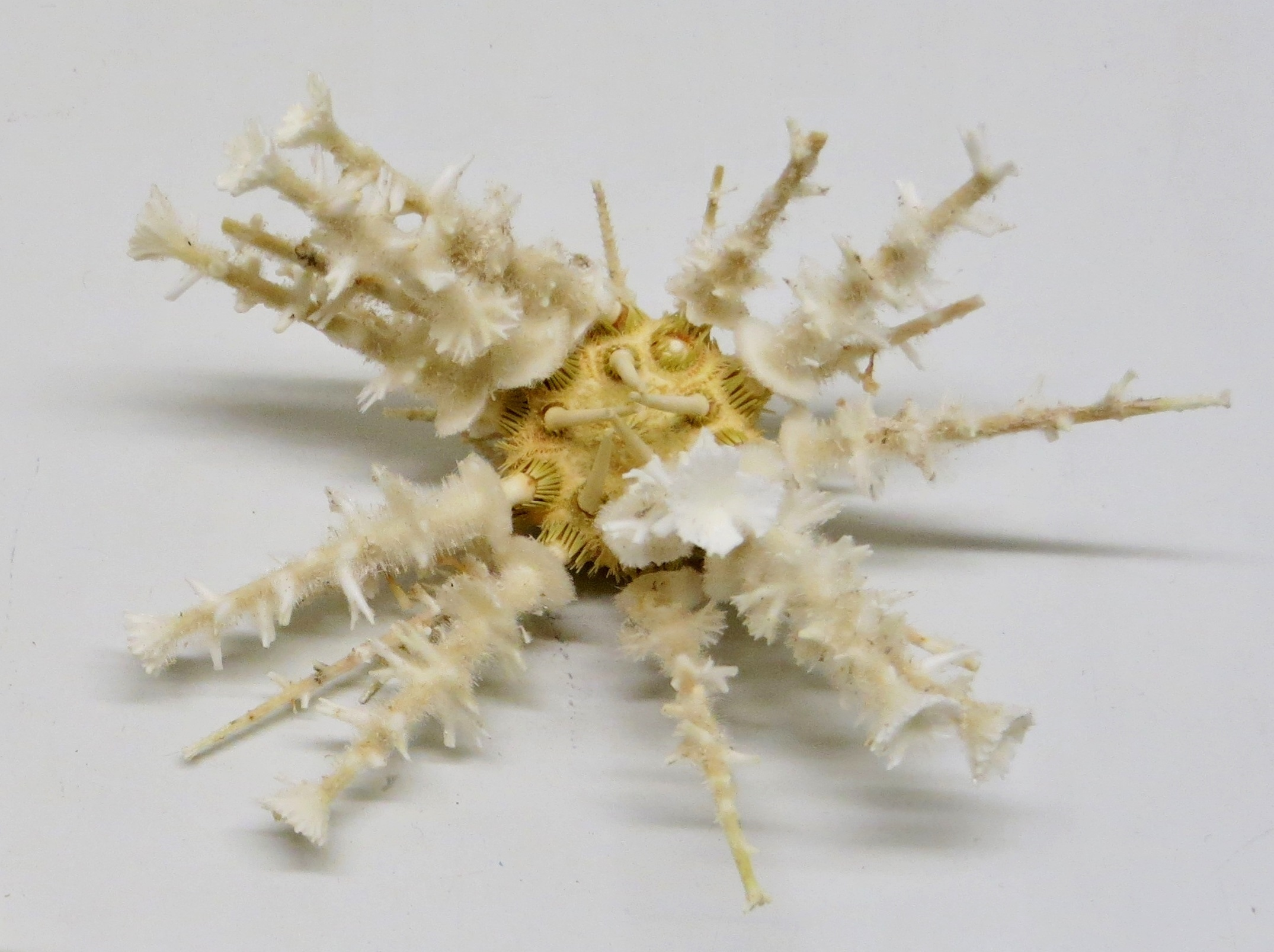 Goniocidaris sp. (collection du Muséum National d'Histoire Naturelle).